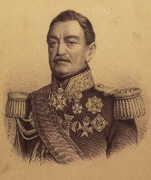 Albert-Florent-Joseph Prisse, né à Maubeuge, le 24 juin 1788, mort à Rome, le 22 novembre 1856, était un militaire, ingénieur, diplomate et homme d’État1 belge, d'origine française.